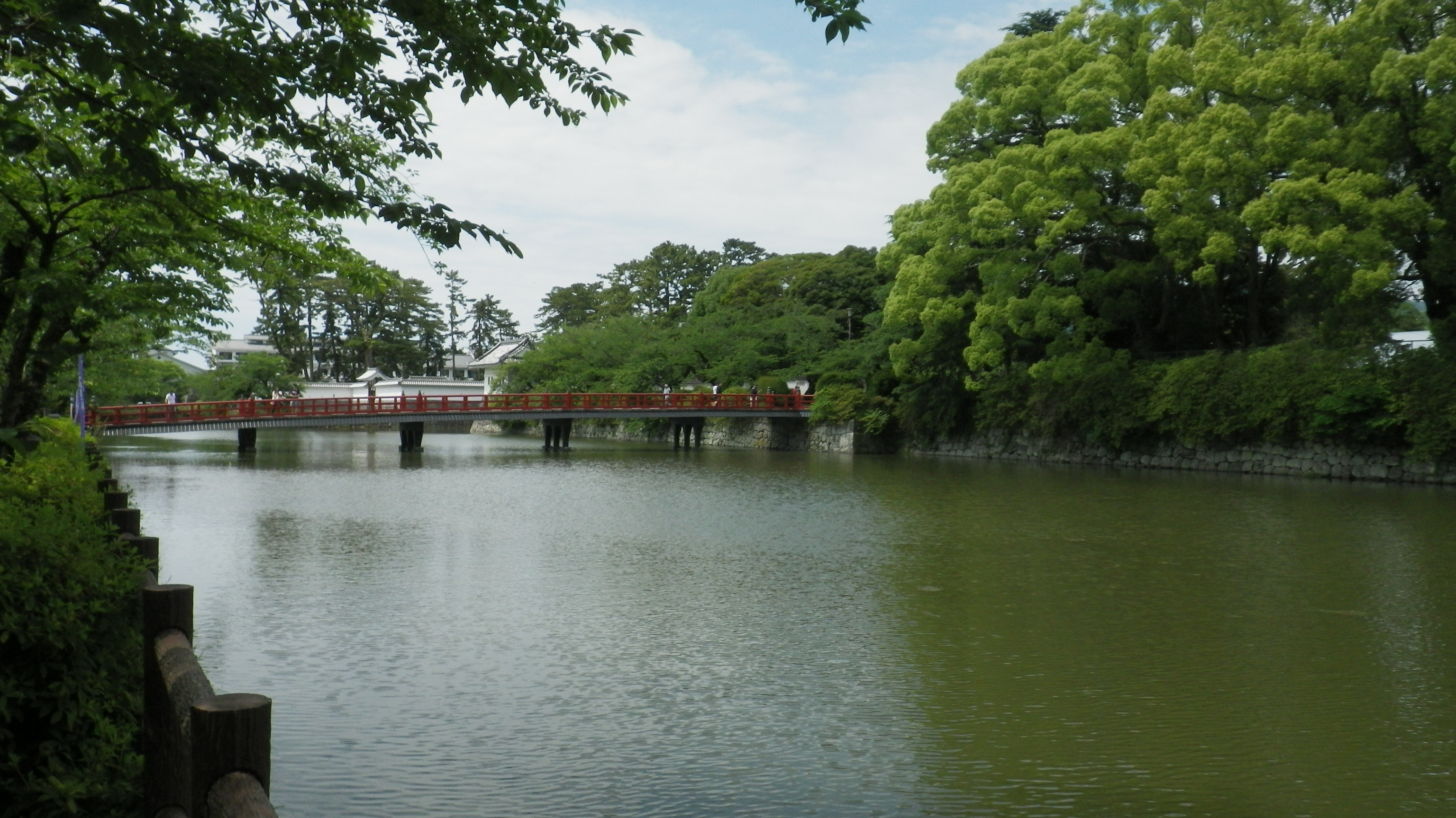 小田原城・二の丸東堀